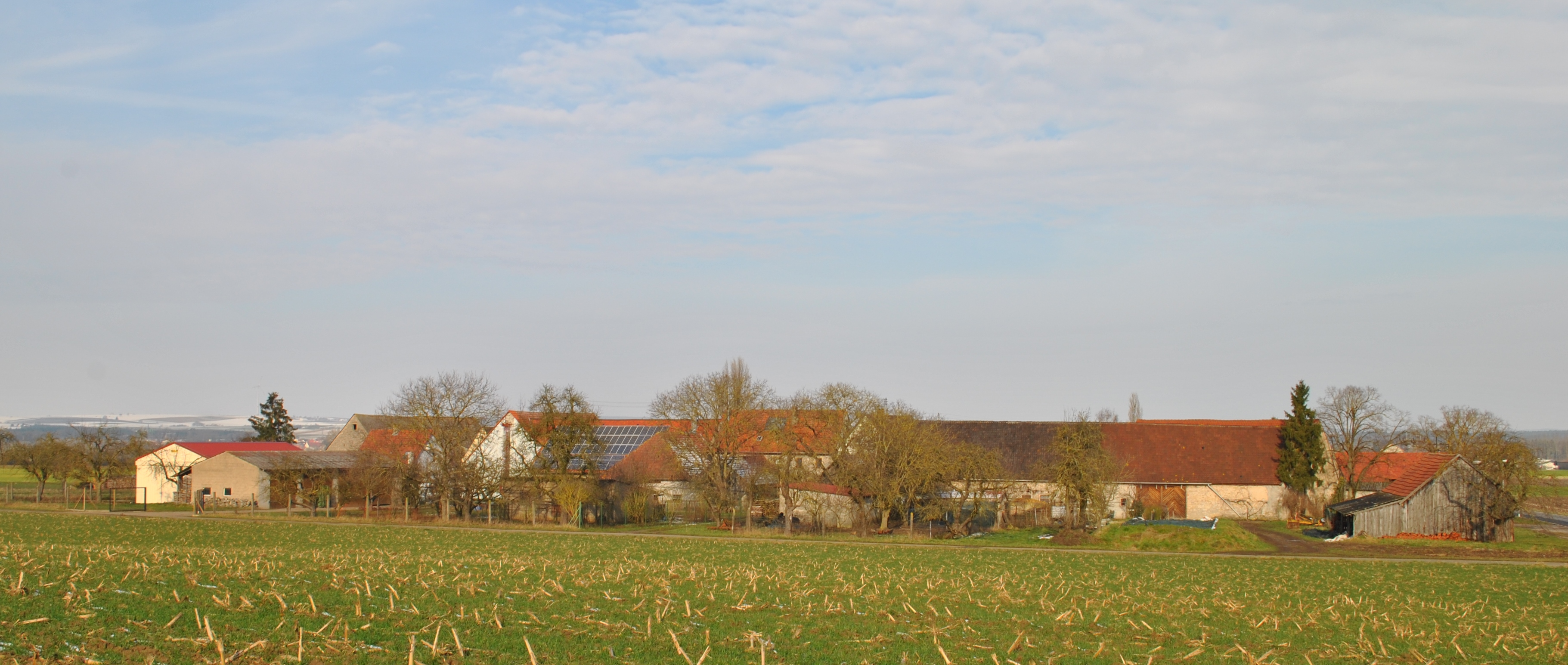 Kleinlangheim-Stephansberg